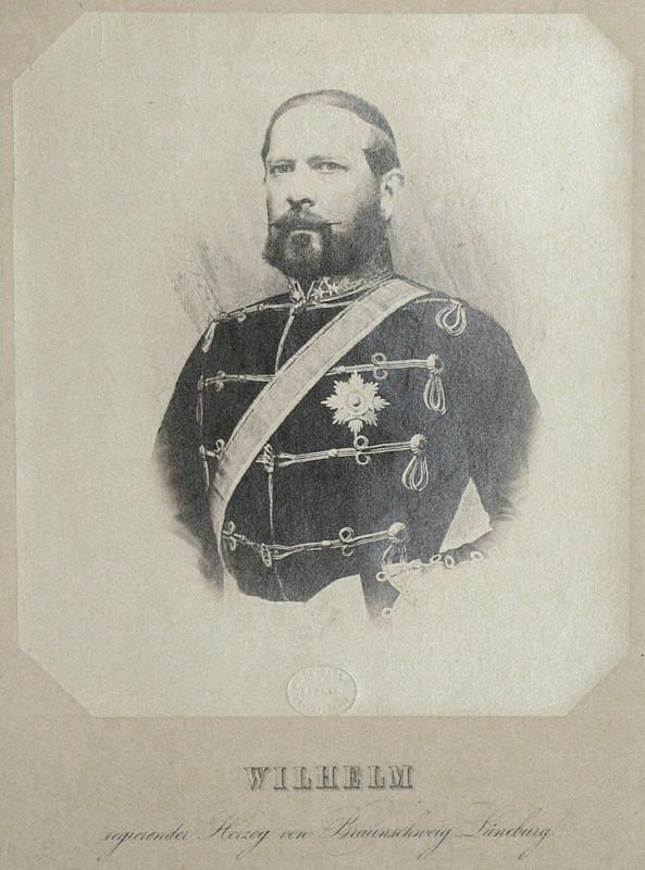 Wilhelm August Ludwig Maximilian Friedrich (* 25. April 1806 in Braunschweig; † 18. Oktober 1884 in Sibyllenort), Herzog zu Braunschweig und Lüneburg. Porträt. Fotografie / Albumindruck, um 1870. Von Emil Schulz. 19,0 x 14,0 cm (Darstellung) / 36 x 30 cm (Trägerkarton). (Braunschweig: Grüneberg's Verlag [1870]).